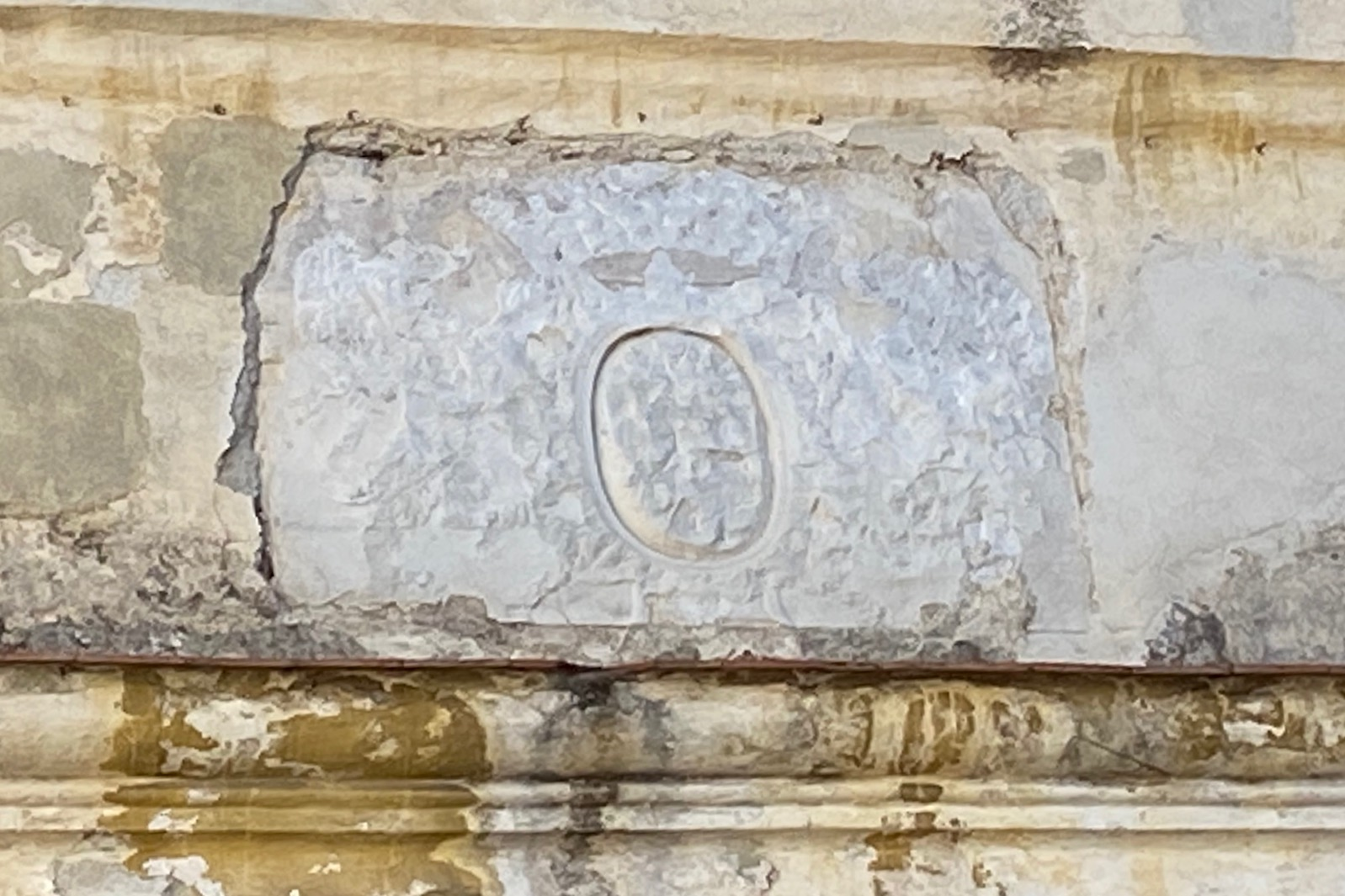 Corsu: Stemma in gattivu statu di a Republica di Ghjenuva, sopr'à una porta di a citatella in Bastia, Corsica.